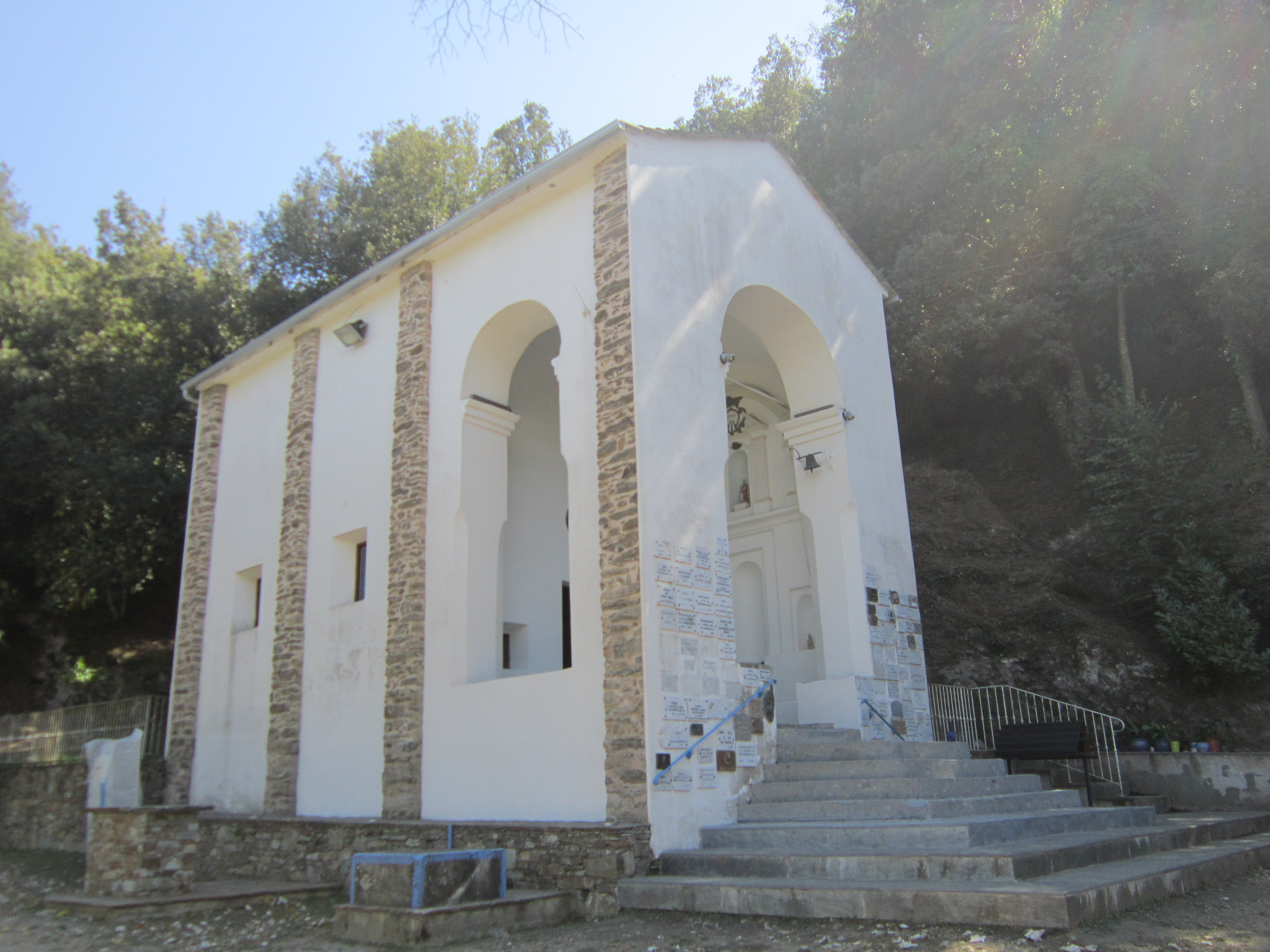 Notre-Dame de PANCHERACCIA (Extérieur)